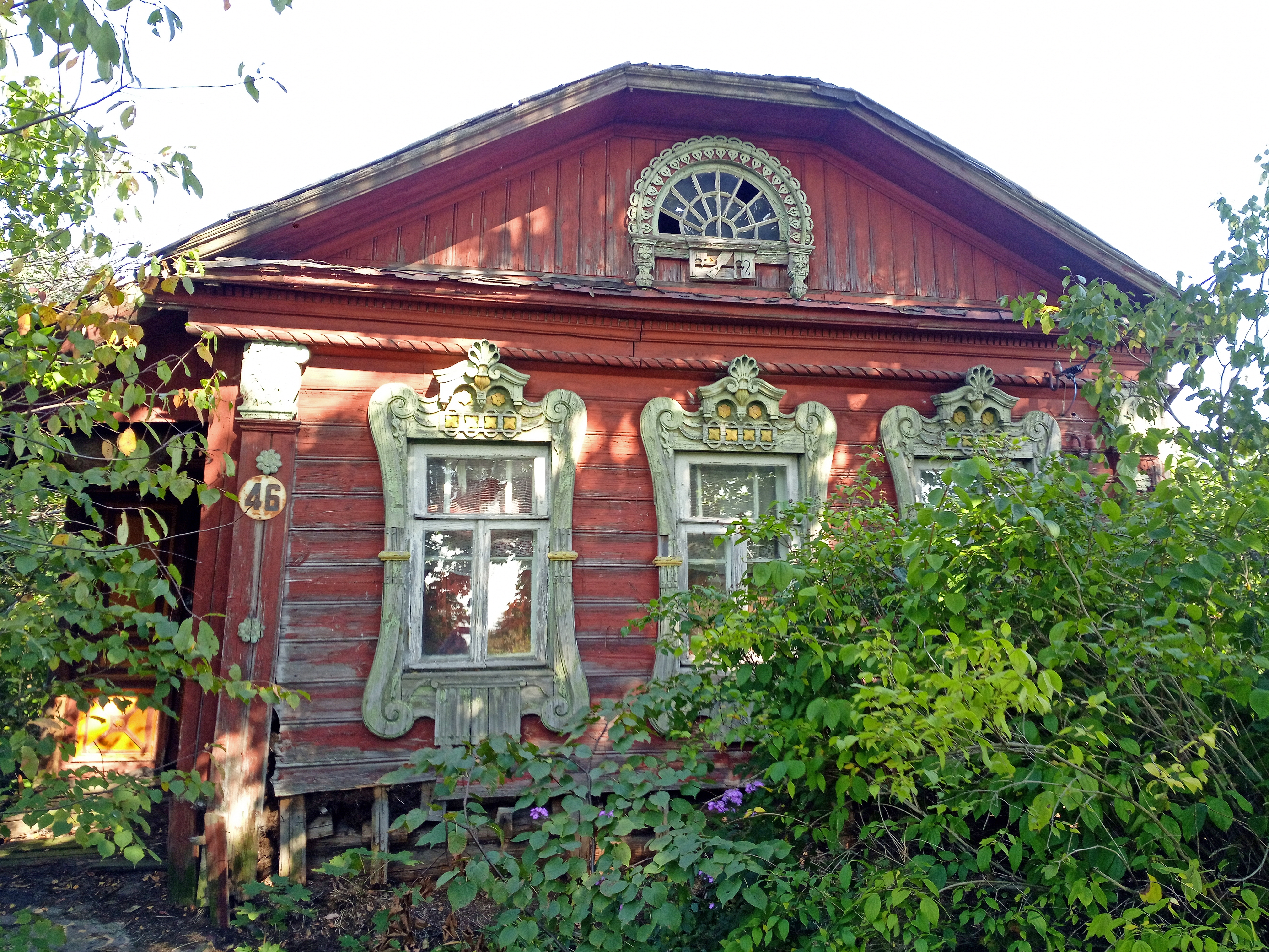 Киржачский район, деревня Никифорово, Сельская улица, дом 46